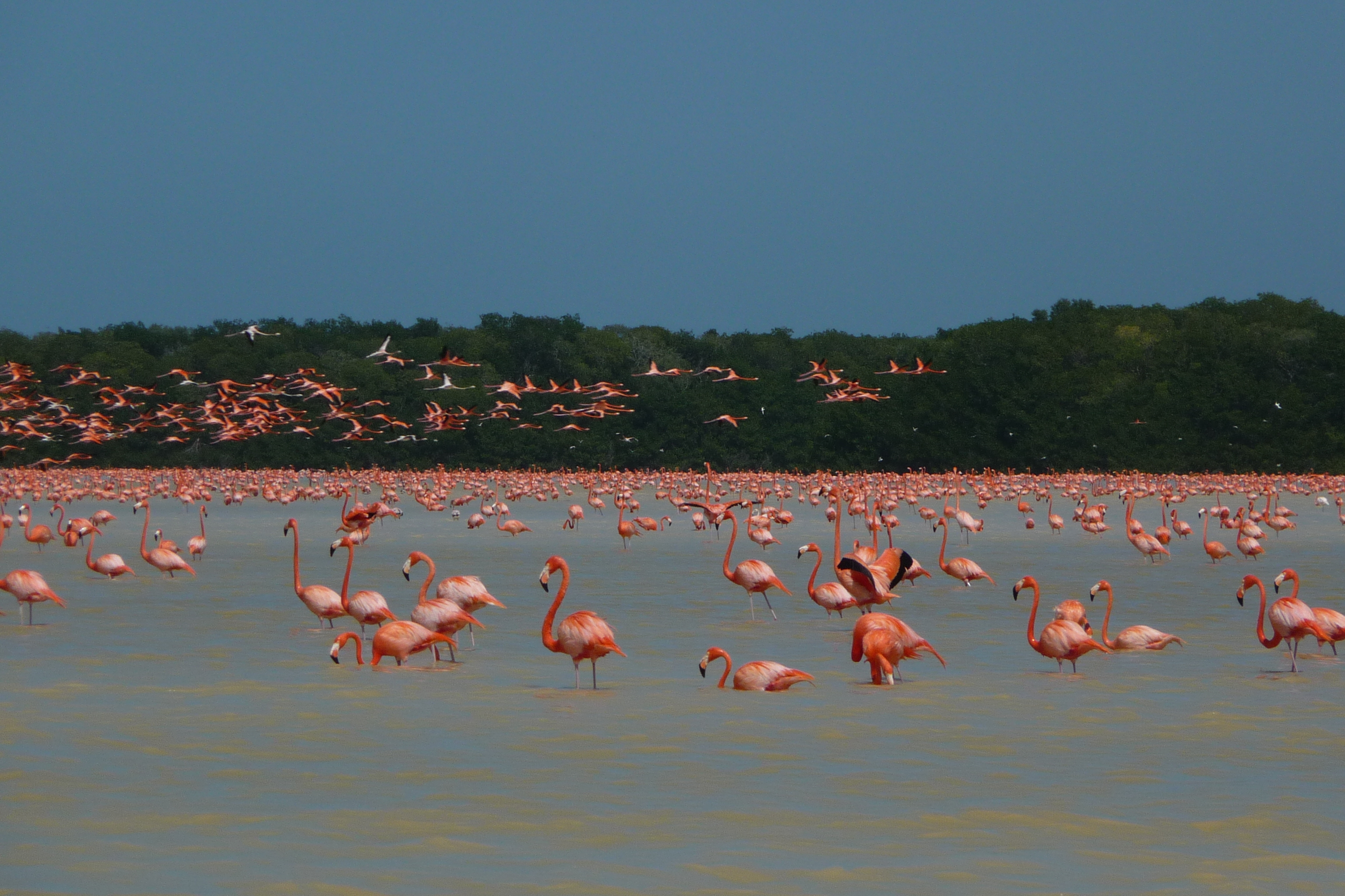 Flamingokolonie in der Lagune vonCelestum